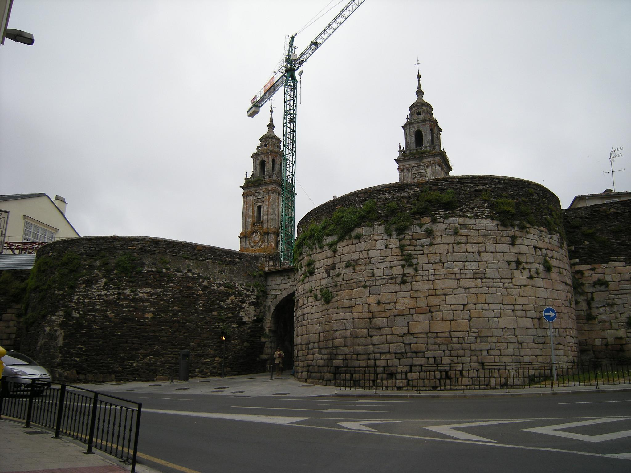 La puerta de Santiago en la Muralla de Lugo con las torres de la Catedral al fondo.